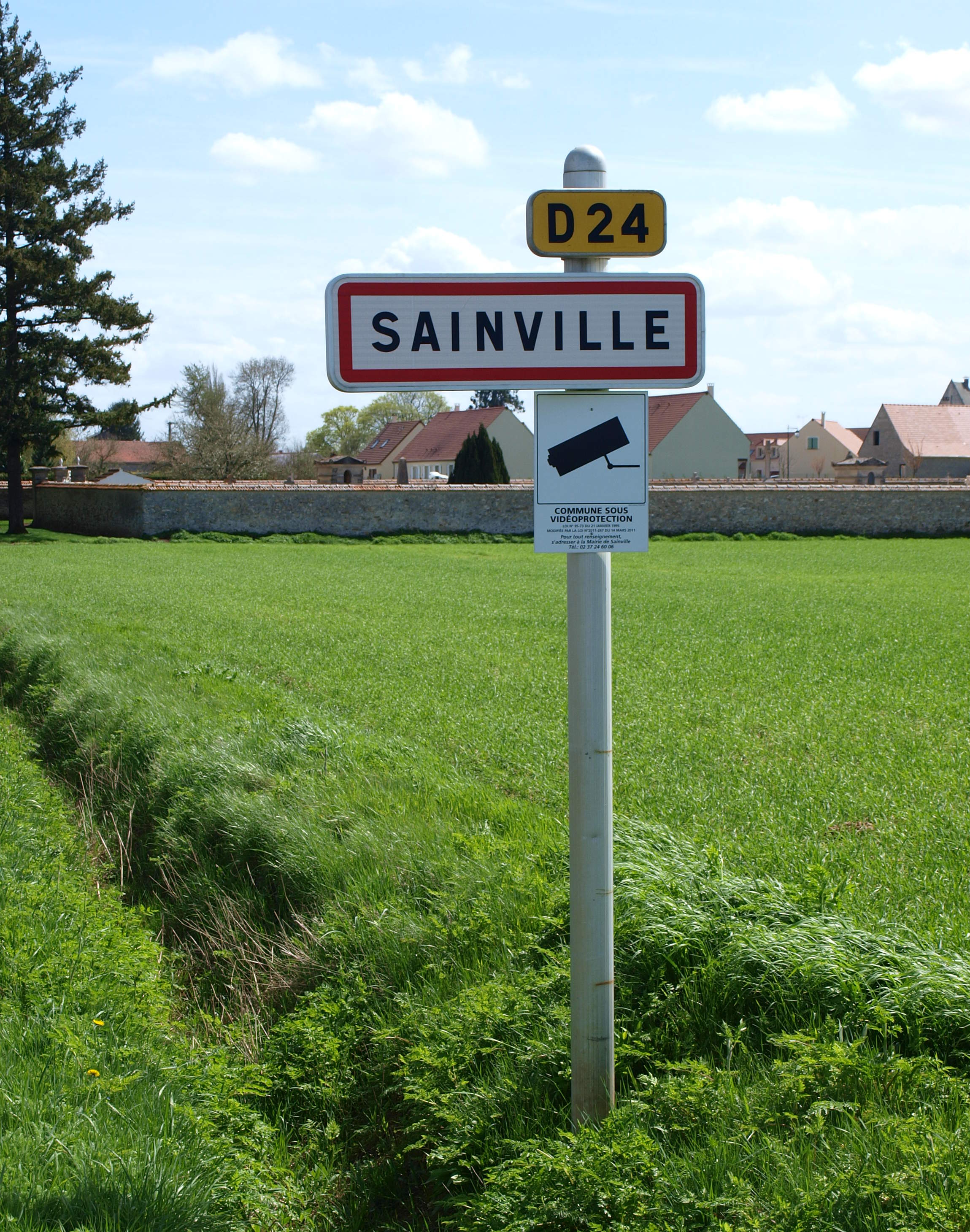 Sainville (Eure-et-Loir, France)